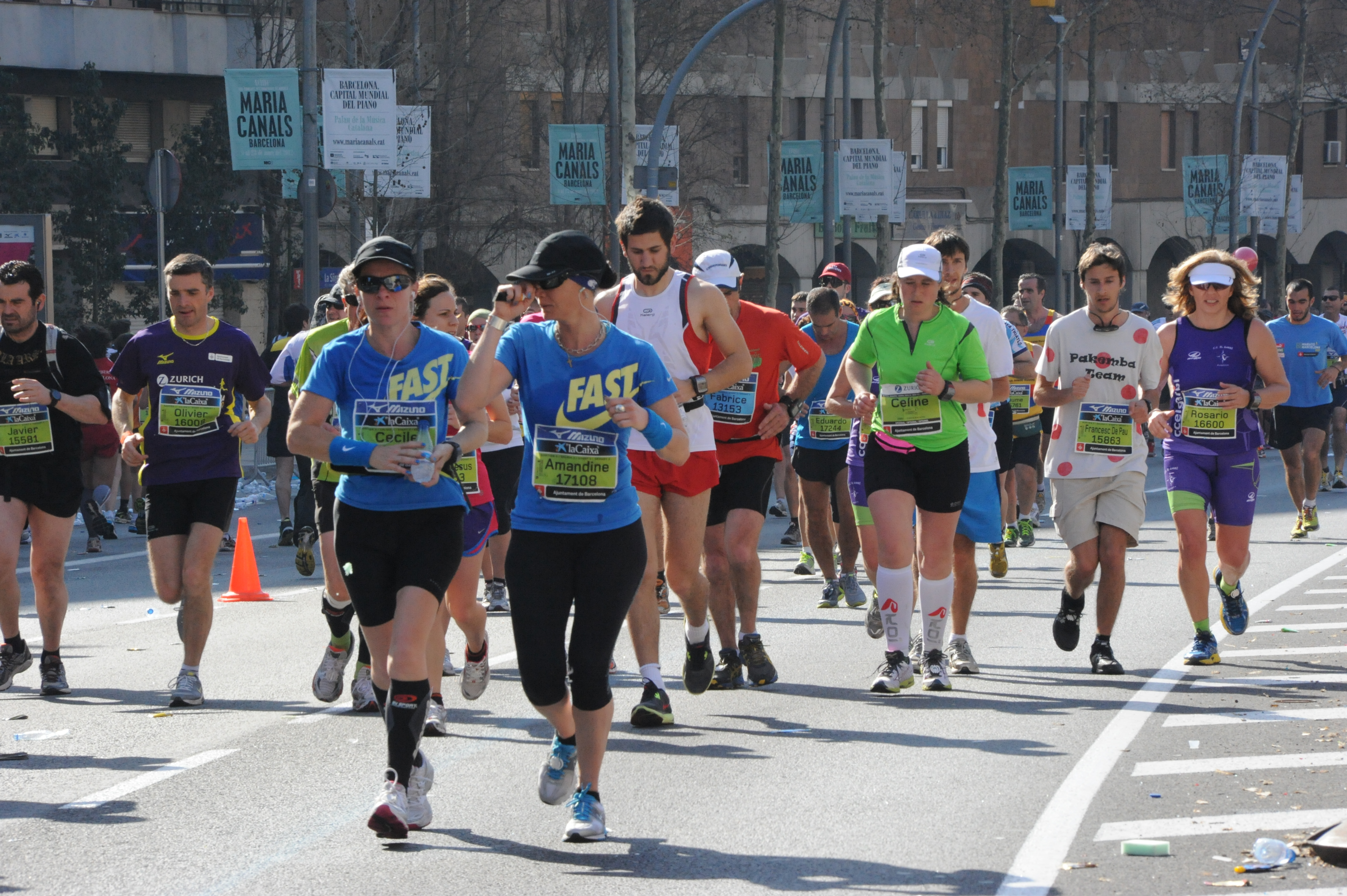 Marató de Barcelona 2012